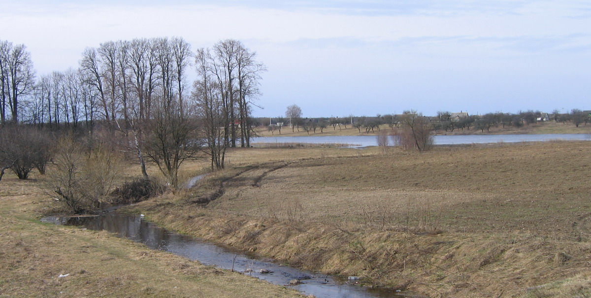 Autoriaus nuotrauka, 2006.04.22. Vazgirdonių ežerėlis. Upeliukas jungia jį su Pabezninkų ežeru. Nuotrauka gali būti platinama pagal GFDL licenciją.